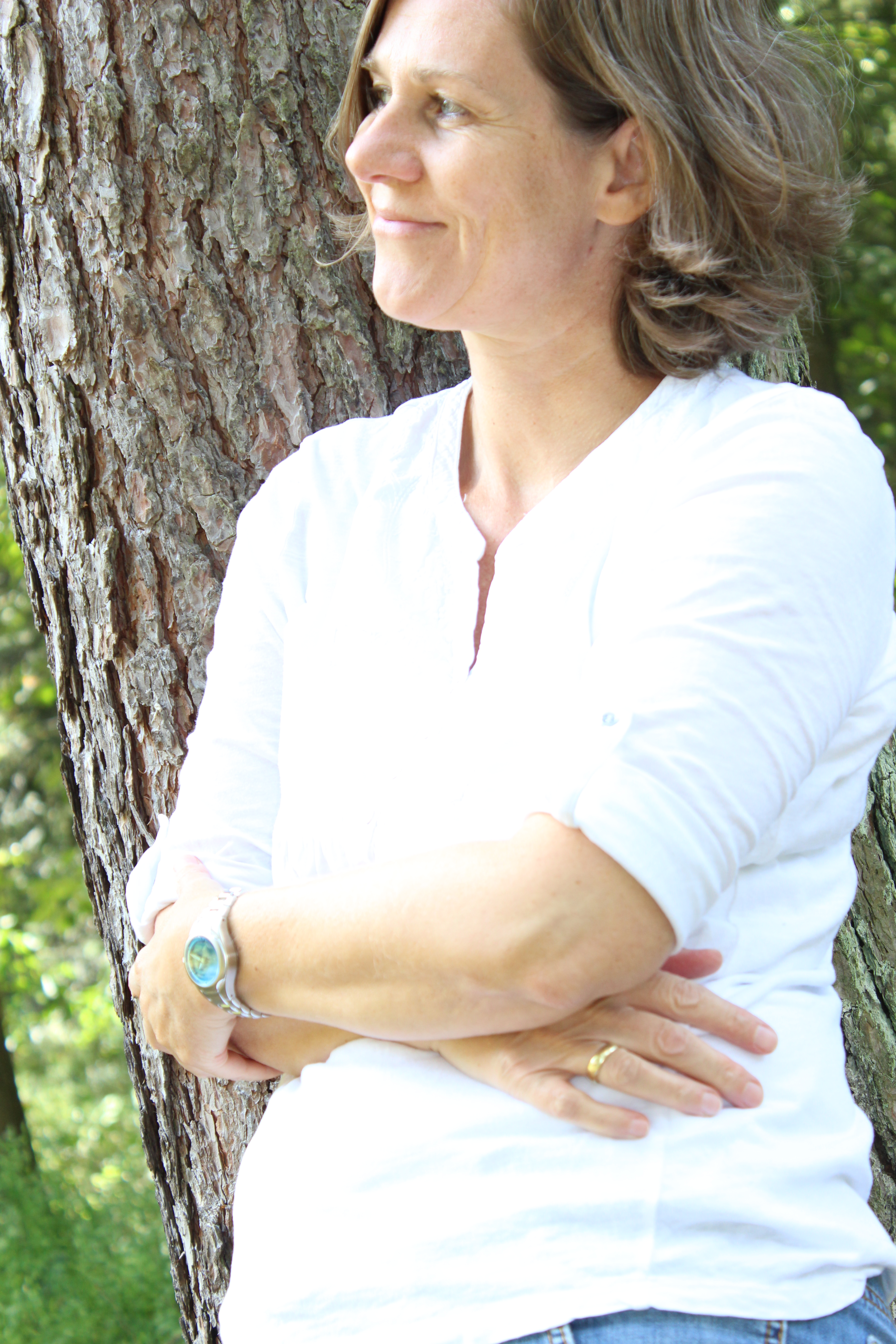 Deitsch: Alice Pantermüller 2013